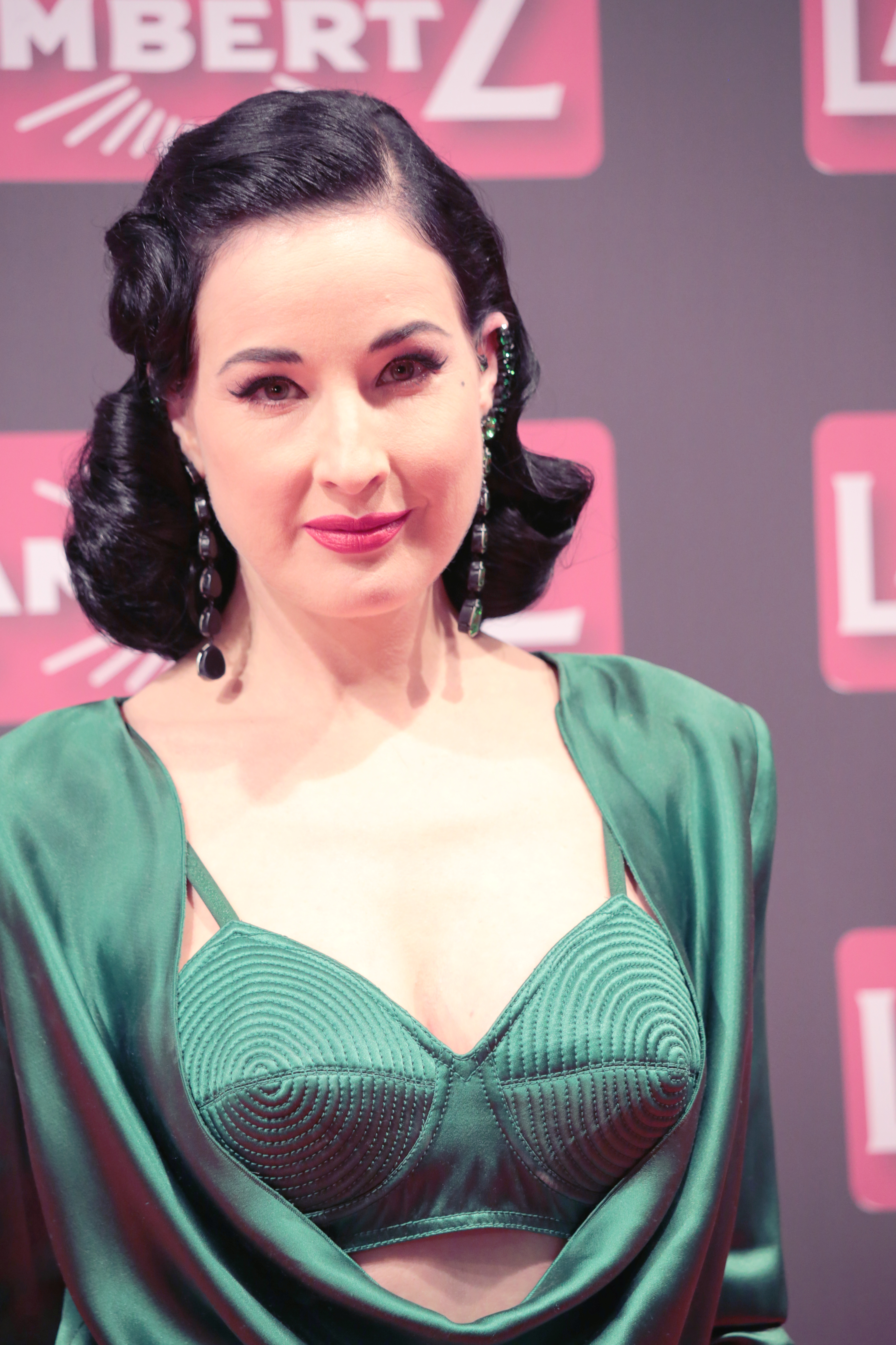 Dita Von Teese bei der Lambertz Monday Night 2018.